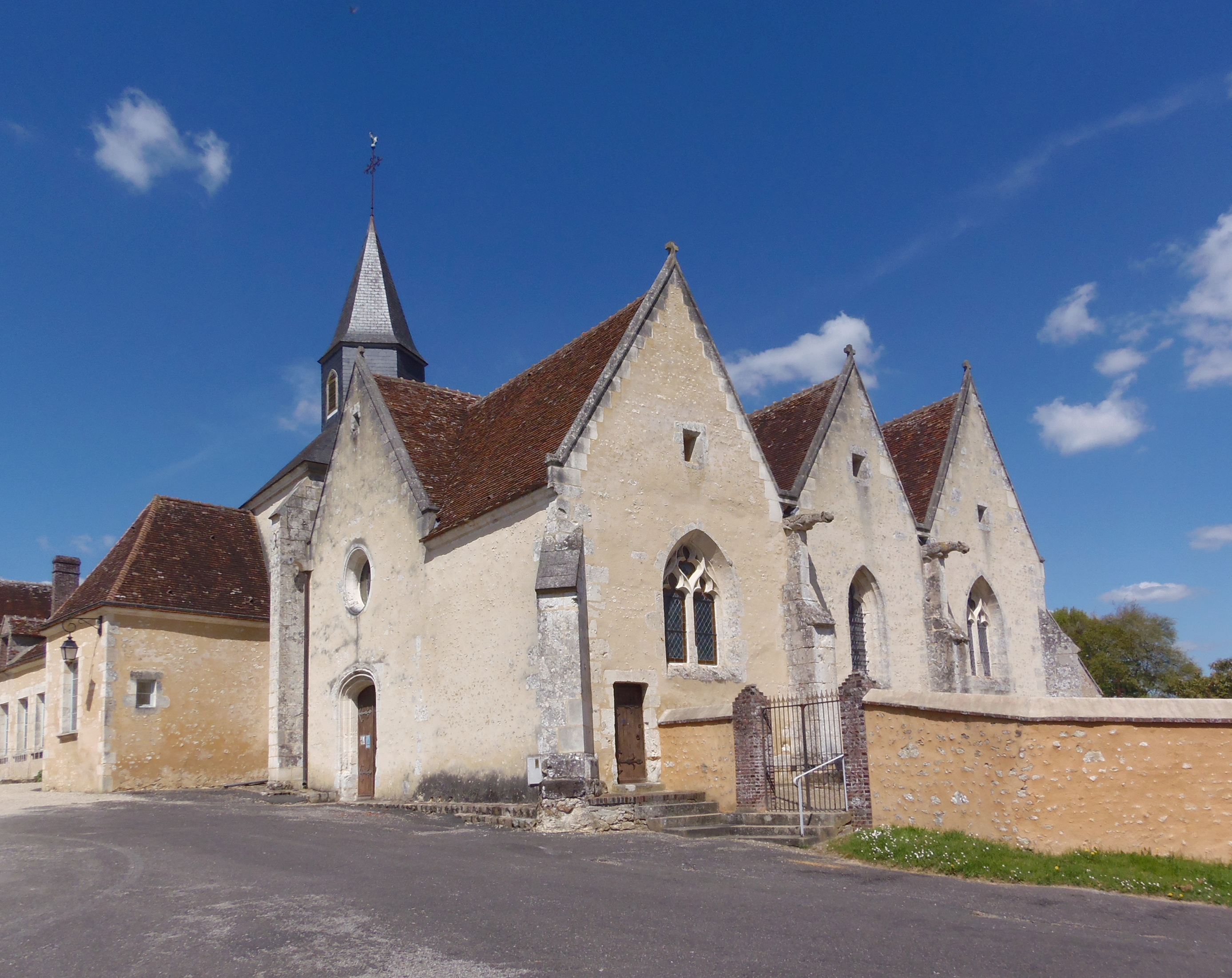 Saint-Germain-des-Grois (Normandie, France). L'église Saint-Germain.